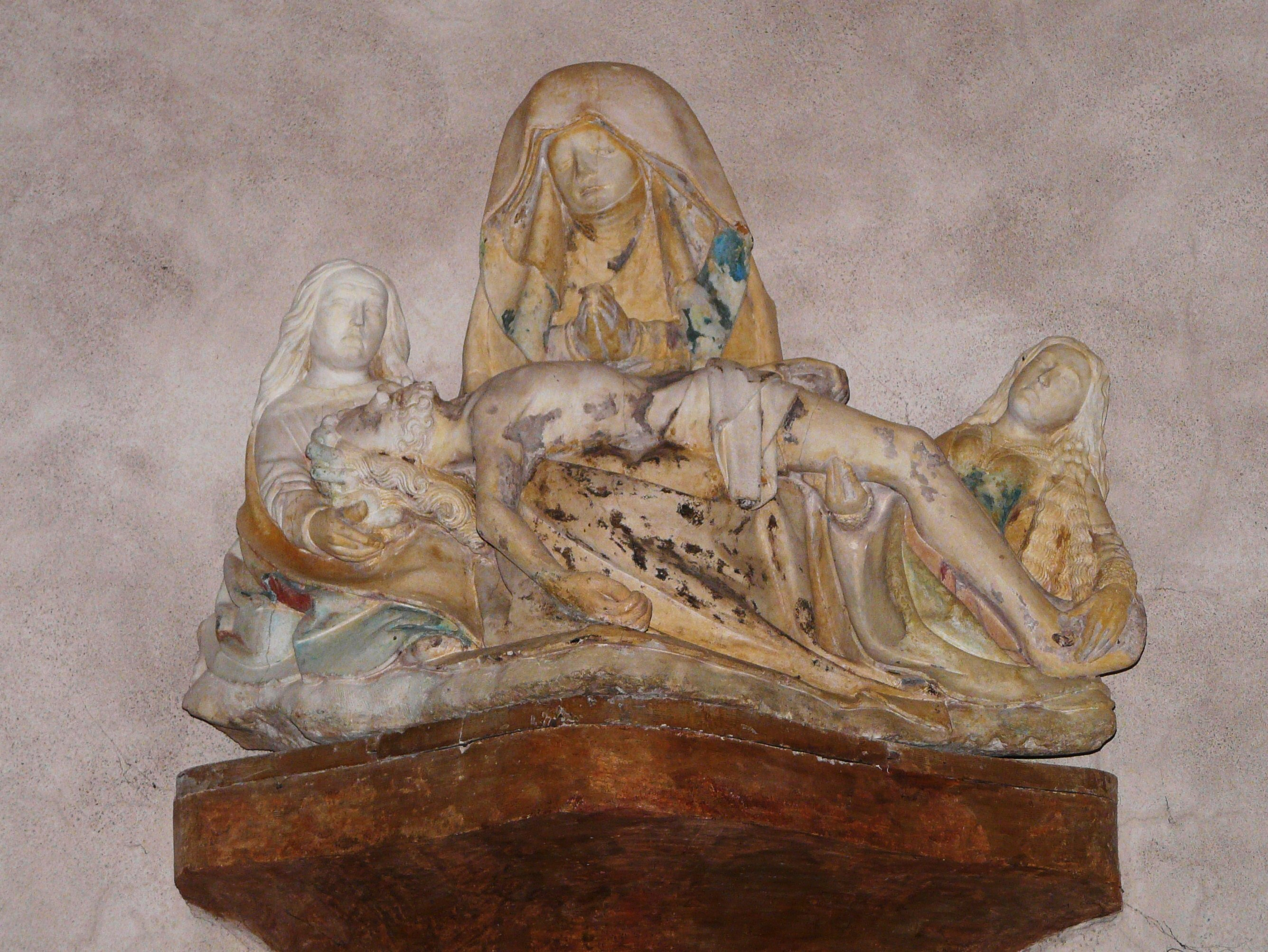 Vierge de Pitié du XVe siècle en calcaire polychrome, église de Saint-Bonnet-la-Rivière, Corrèze, France.